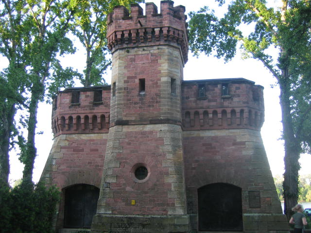 Kapponiere am Feldbergplatz